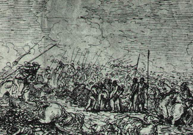 Jean Pierre Norblin de la Gourdaine (1745 -1830). KOŚCIUSZKO POD MACIEJOWICAMI [Kosciuszko at Maciejowice].